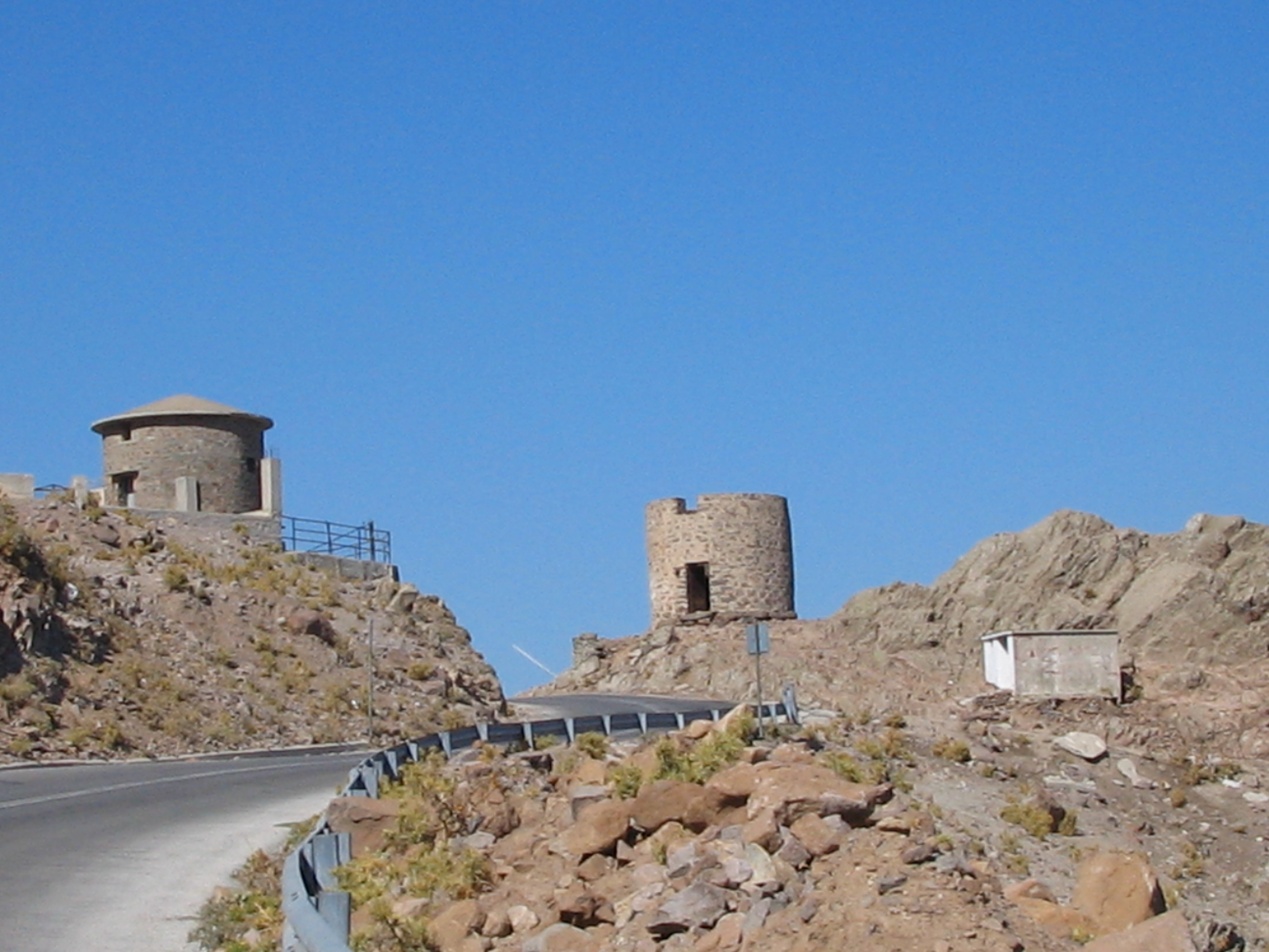 Windmills in Agra, Lesbos, Greece